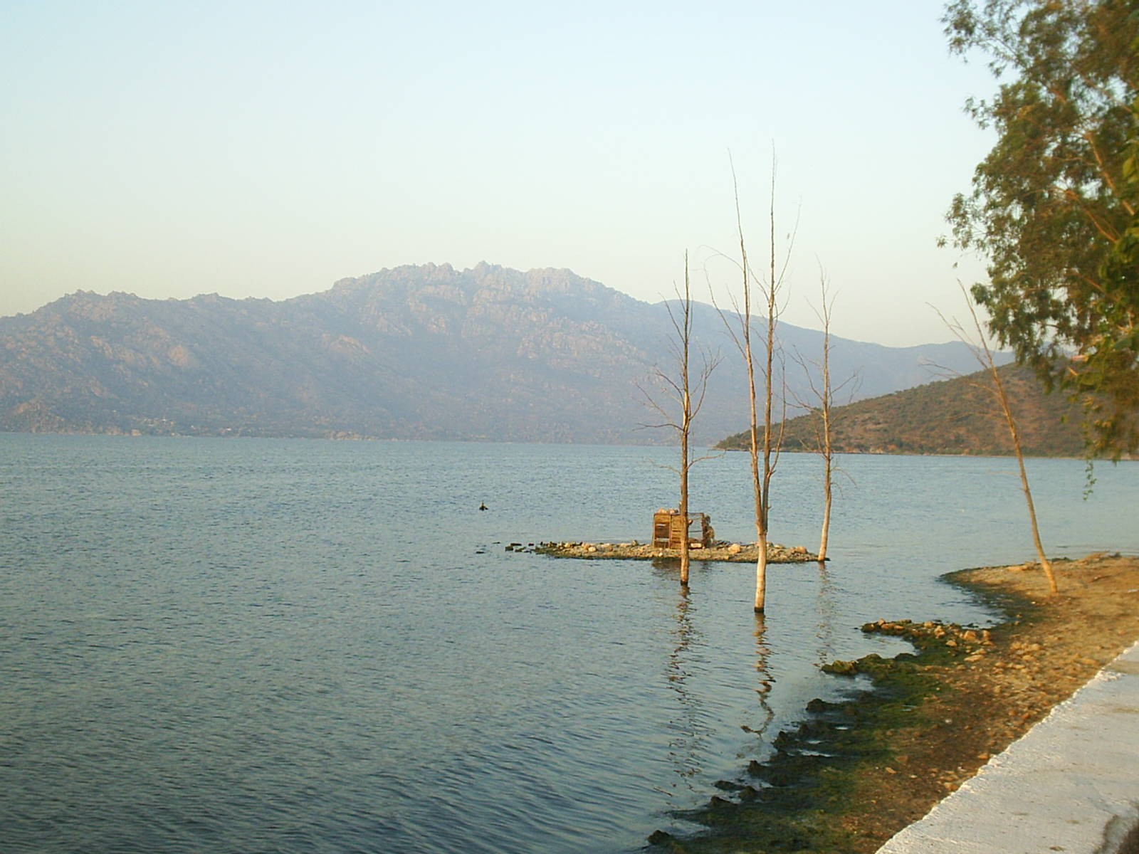 Bafa Lake, Turkey